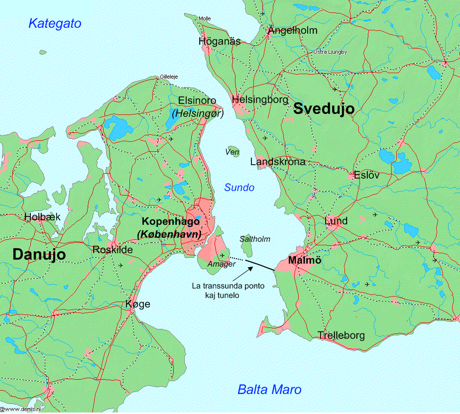 Mapo pri Sundo, la markolo inter Svedujo kaj Danujo. La mapo estas bazita sur libera bildo en la komunejo.